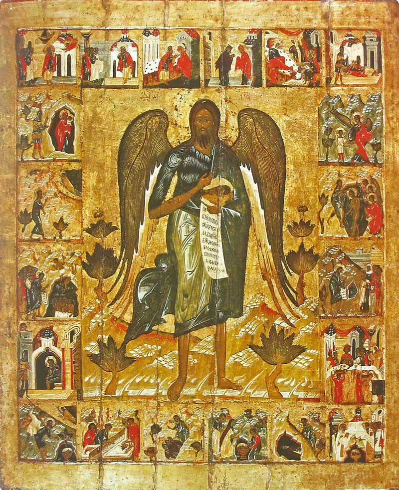 Иоанн Предтеча Ангел Пустыни, с житием в 20 клеймах Школа или худ. центр: Ярославль Ок. 1551 г. 124 × 103 см Ярославский историко-архитектурный и художественный музей заповедник, Ярославль, Россия Инв. 40955 Происходит из церкви Николы Надеина в Ярославле.